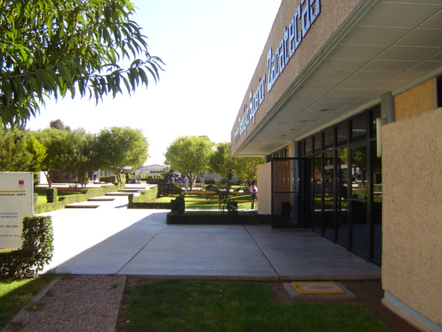 Dirección ITSZN